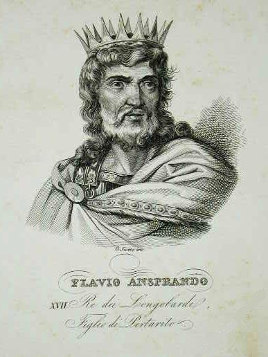 Retrato de Flavio Ansprando, Rey de lo Lombardos y Rey de Italia